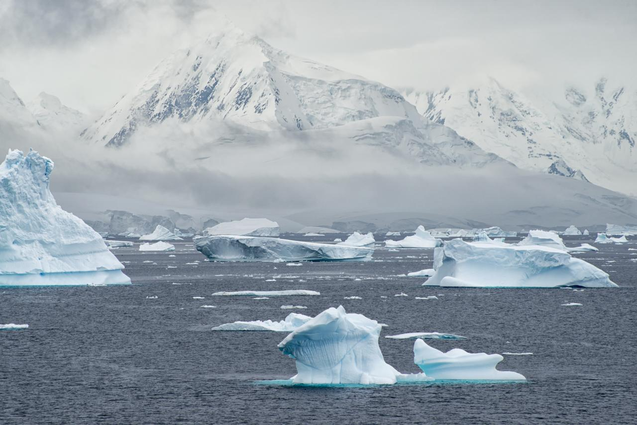 Antarctica